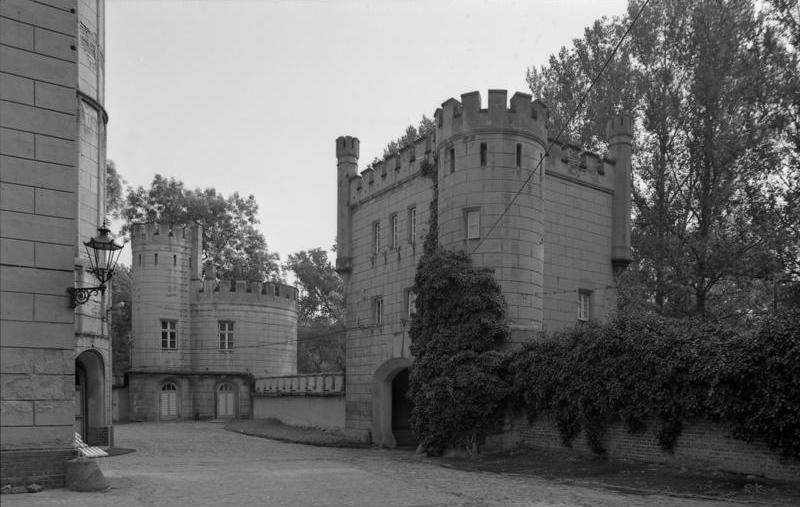 11.-18.8.1991 Bundesland Sachsen-Anhalt, Letzlingen Schloß und Klinik